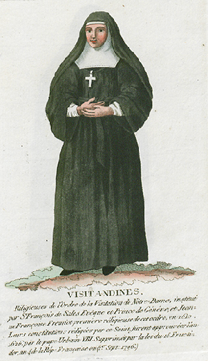 Collection de costumes de tous les ordres monastiques, supprimés à differentes époques, dans la ci-devant Belgique, Bruxelles, Philippe Joseph Maillart et sœur, 1811